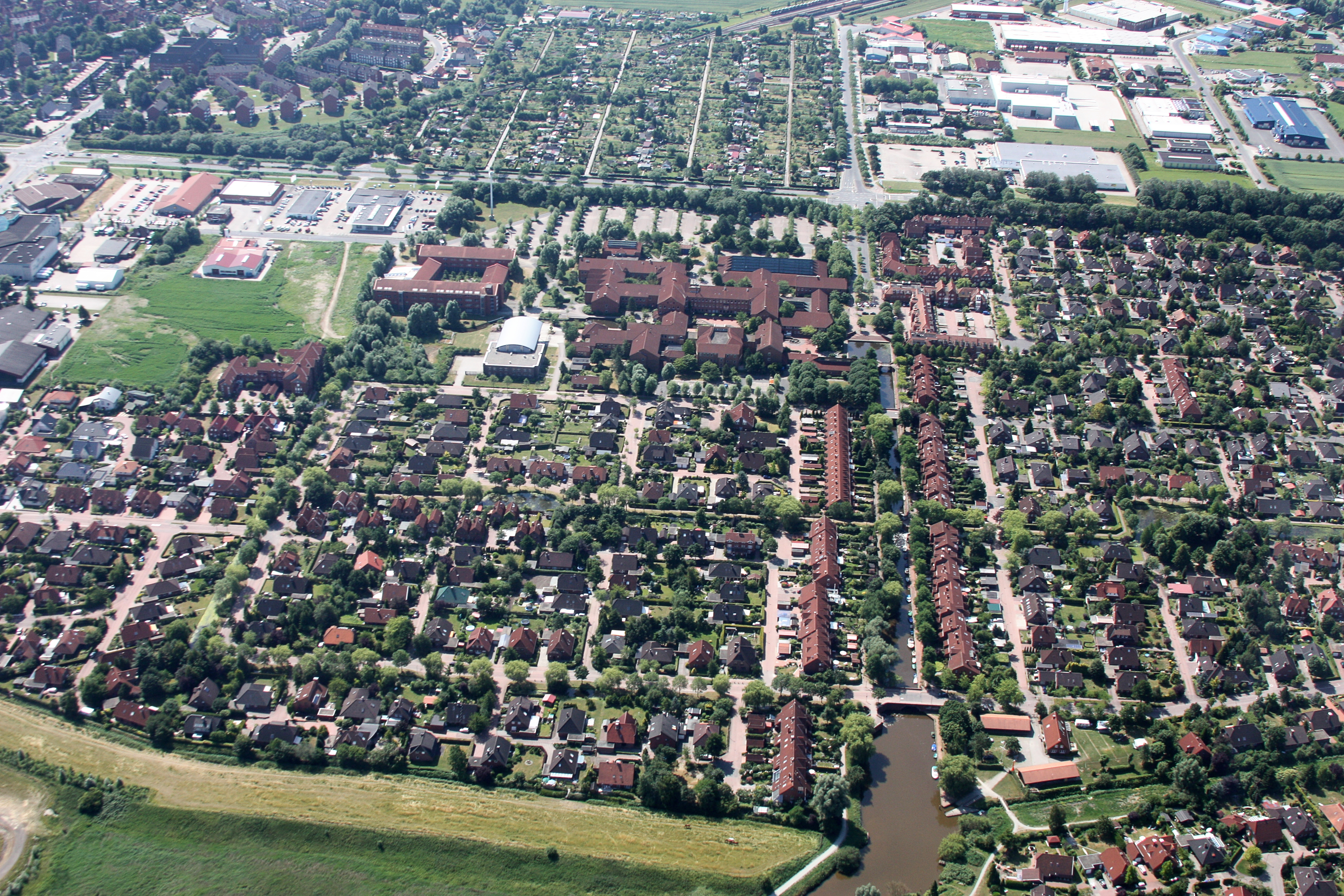 Flug über Emden; Flughöhe 1500 ft; Juli 2010; Originalfoto bearbeitet: Tonwertkorrektur und Bild geschärft mit Hochpassfilter